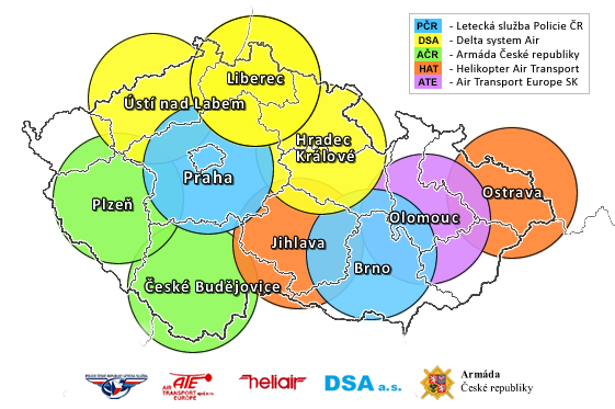 PPŘEHLED STANIC Letecké záchranné služby v České republice /LZS ČR HEMS Provoz letecké záchranné služby v České republice k 1.1.2017 Aktuální seznam rozložení jednotlivých územních středisek LZS a jejich akční rádius dle nových provozovatelů. Leteckou záchrannou službu zajišťují v České republice společnosti Air Transport Europe ( ATE ), Helicopter Air Transport ( HeliAir ) , DSA, Letecká služba Policie ČR a Armáda ČR, s nimiž má Ministerstvo zdravotnictví uzavřené smlouvy dle tendru na provoz Letecké záchranné služby od 1.1.2017.